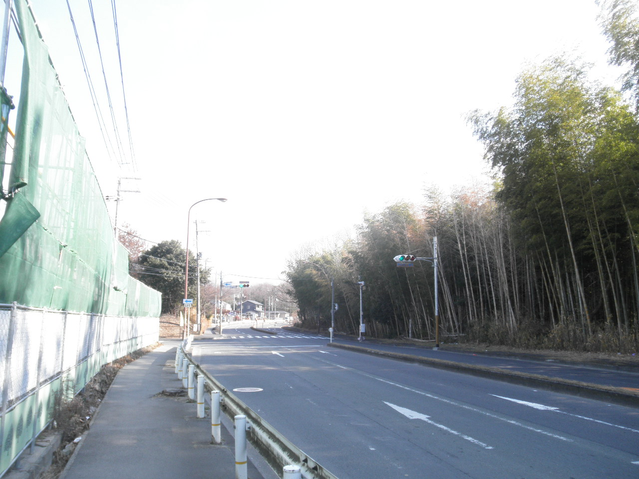 奈良県奈良市佐紀町 ならやま大通り